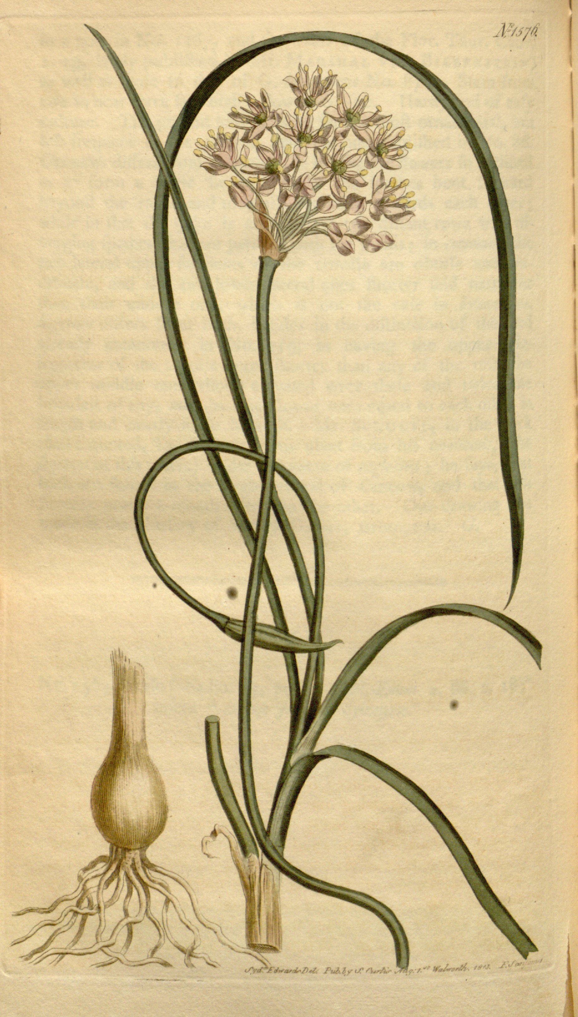 Allium stellatum Nutt. ex Ker Gawl.